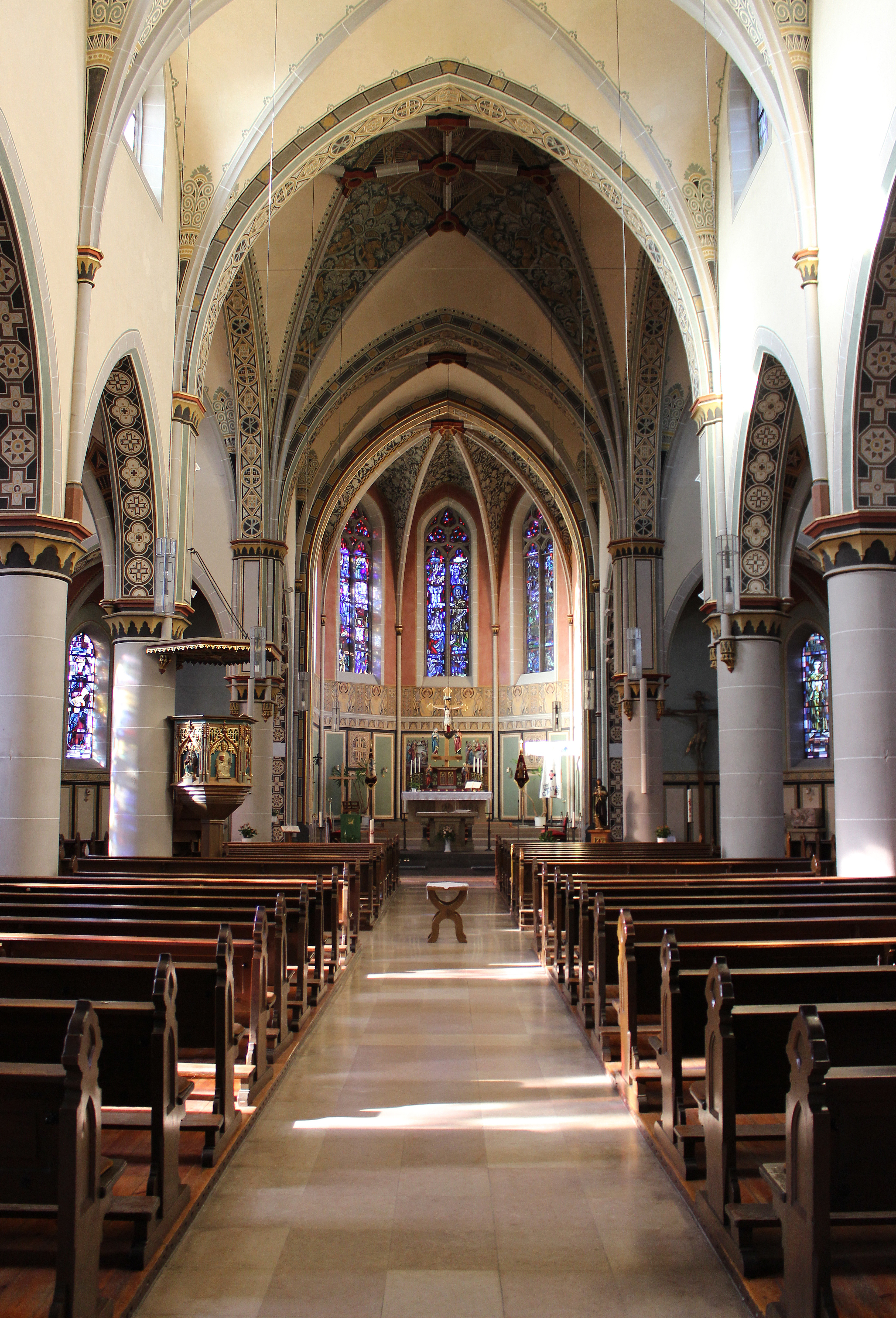 Blick ins Innere der katholischen Pfarrkirche St. Johannes Baptista in Altenkessel, einem Stadtteil der saarländischen Landeshauptstadt Saarbrücken